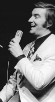 Michael Hansen, Dagmar Frederic, Peter Wieland ADN-ZB Franke 11-5-73 Berlin: Neue Revue "Expo 73" im Friedrichstadtpalast Heiter und beschwingt, musikalisch und tänzerisch will diese Revue im Monat Mai besonders die Freunde der Tanzmusik, des Balletts und des Musicals ansprechen. Auftritt von Michael Hansen (l.), Dagmar Frederic (M.) und Peter Wieland (r.). Abgebildete Personen: Frederic, Dagmar: Schlagersängerin, DDR Hansen, Michael: Schlagersänger, DDR Wieland, Peter: Schlagersänger, DDR